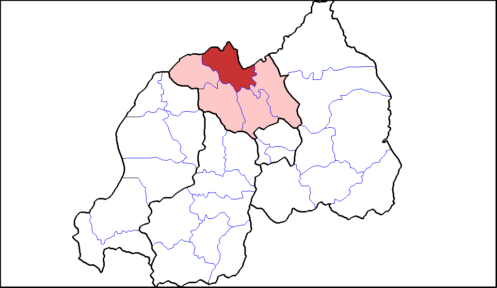 Distretto di Burera.